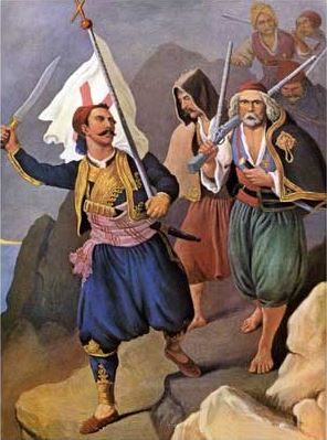 Πετρόμπεης Μαυρομιχάλης, «ο Μαυρομιχάλης επανιστά την Μεσσηνίαν»